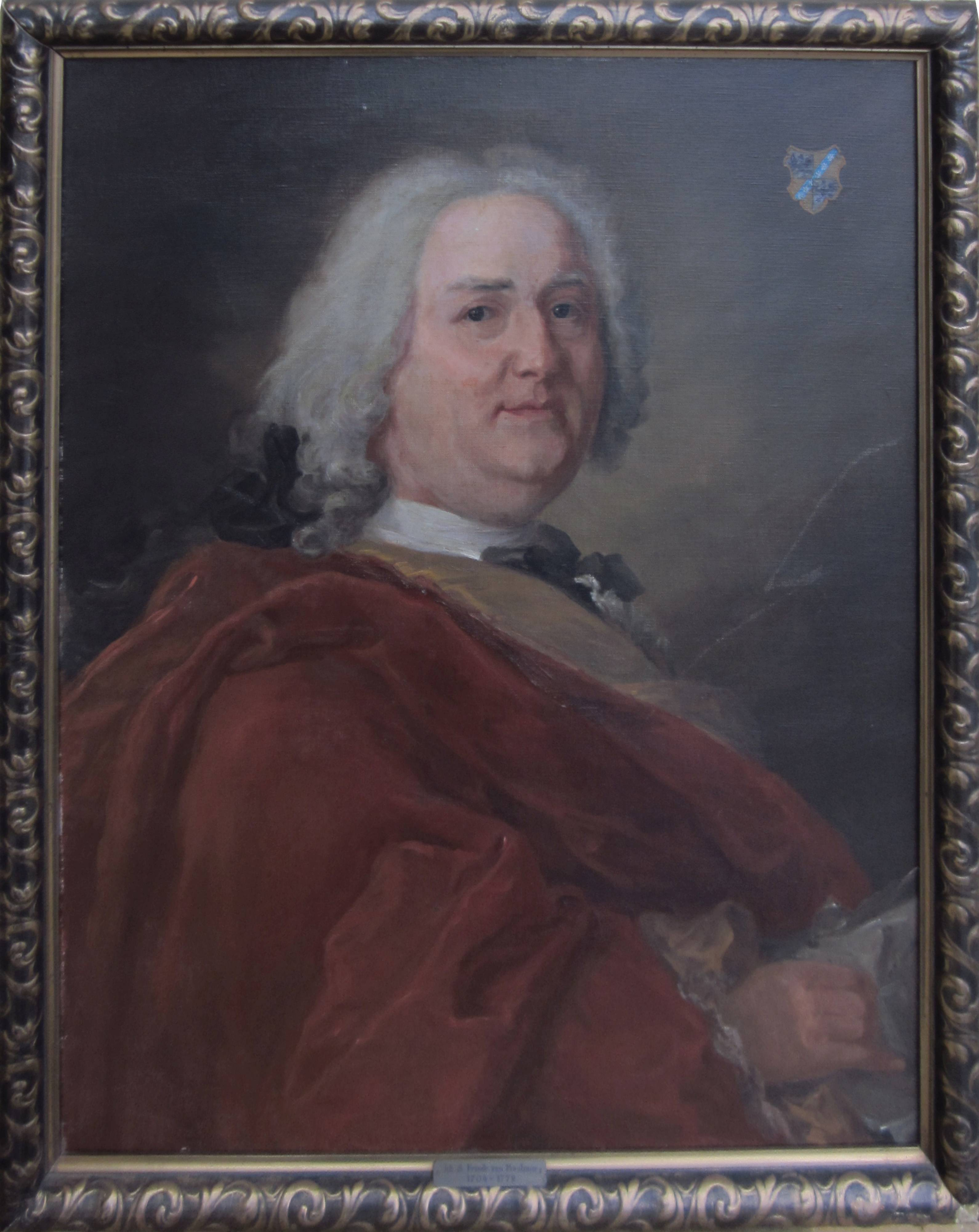 Johann Samuel Friedrich von Böhmer (1704–1772), zu Lebzeiten der dargestellten Person geschaffenes Gemälde. Durch Marie Luise Ottilie von der Osten (* 25. Dez. 1856, † nach 1932) hiervon 1930 angefertigte originalgetreue Kopie in Öl auf Leinwand. Hiervon 2014 erstellte fotomechanische Reproduktion